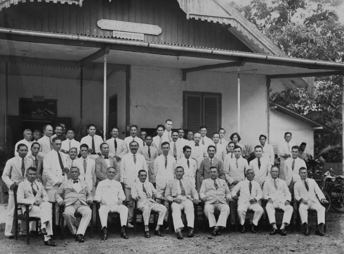 Foto. Foto bersama anggota Indo-Europees Verbond di muka gedung pertemuan klub di Bogor.